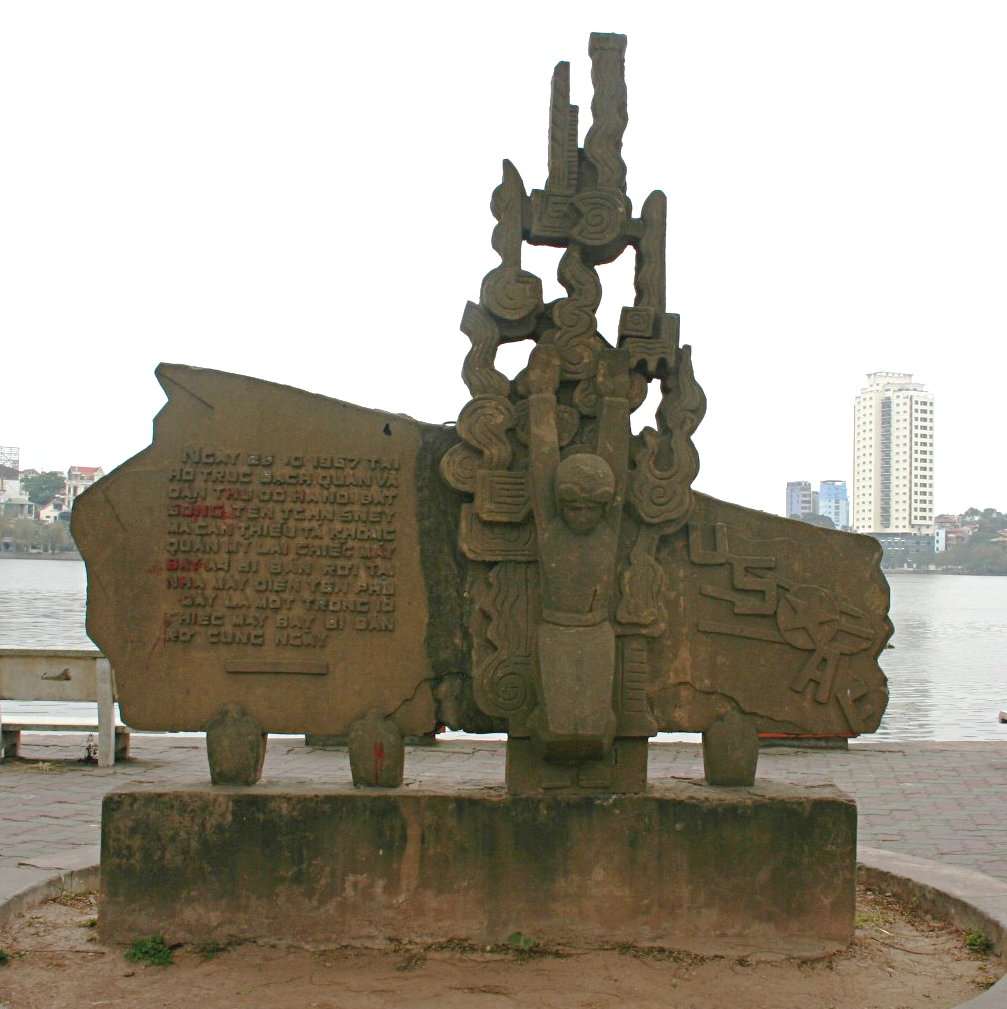 Chỉnh sửa kích cỡ và ánh sáng